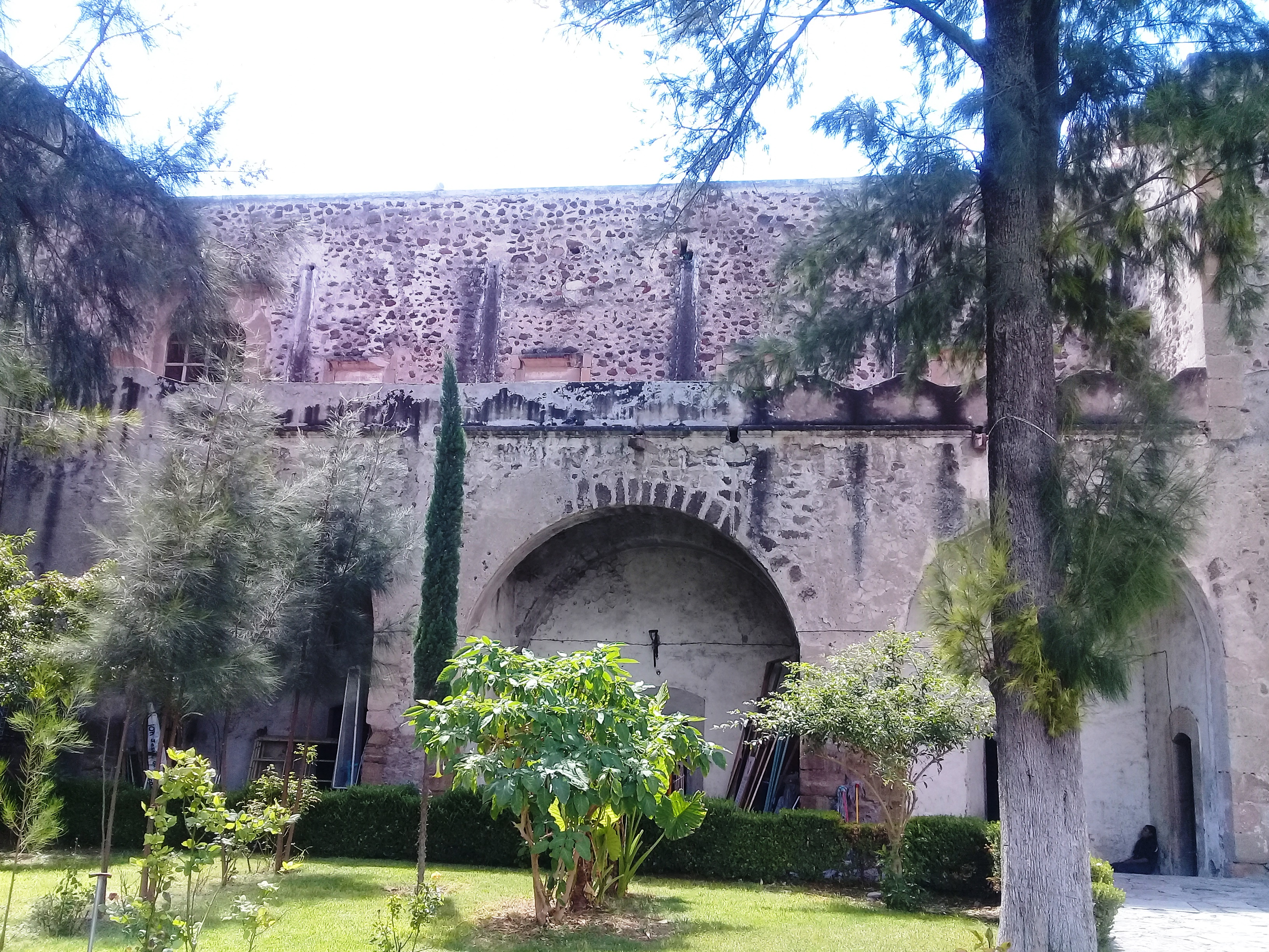 Templo y exconvento de San Nicolás de Tolentino (Actopan).